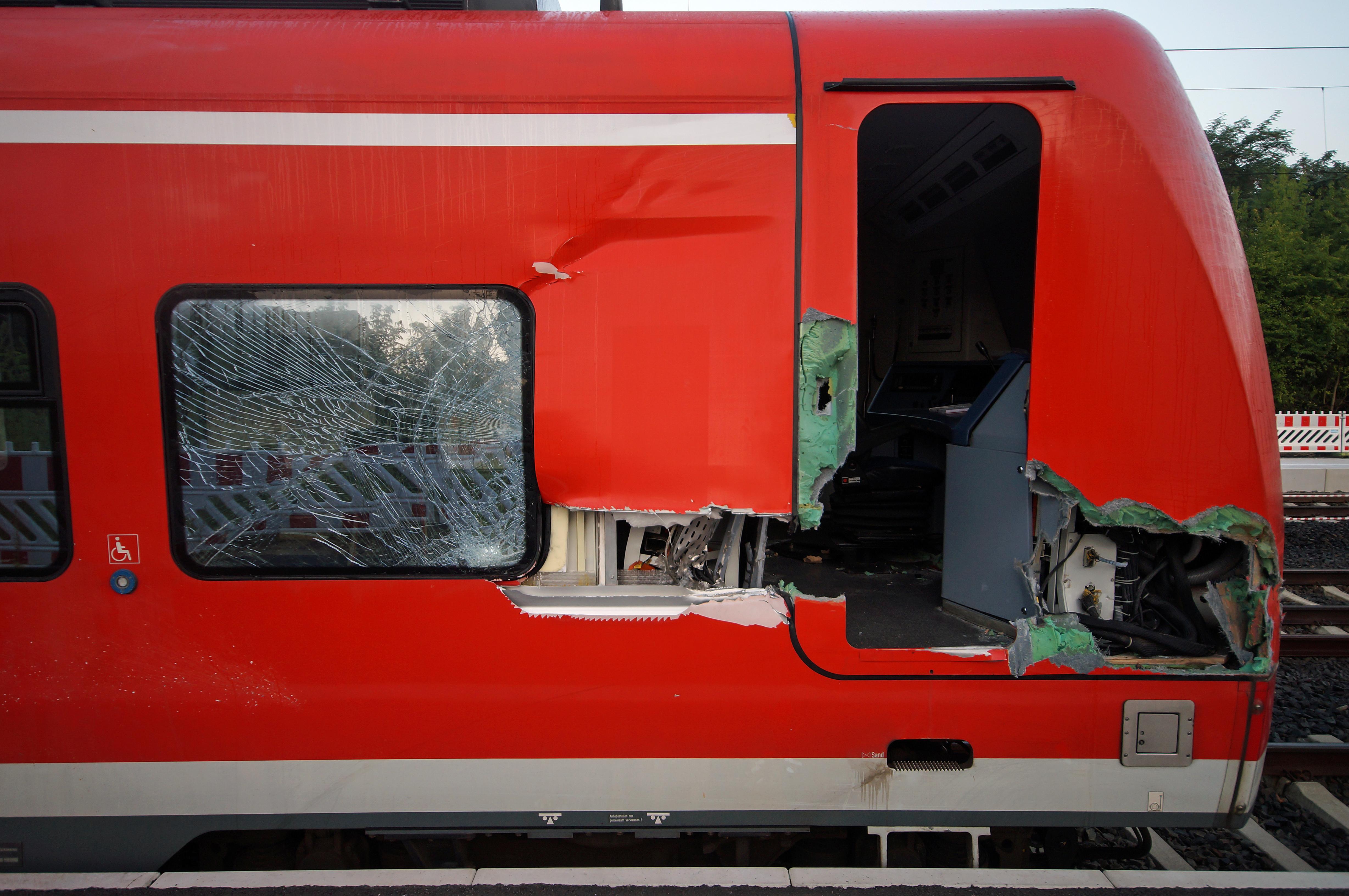 Der fotografierte Triebzug 425 761-4 der DB-Baureihe 425 (1999) stieß am Nachmittag des 16. September 2014 gegen 17:00 Uhr auf der Bahnstrecke Mainz–Mannheim auf der Höhe des gerade in Bau befindlichen Haltepunkts Dienheim gegen die Schaufel eines Baggers. Der Triebzug war als Regionalbahn 38756 auf dem Weg Richtung Mainz. Zum Zeitpunkt der Aufnahme steht der Triebzug im Überholgleis des Bahnhofs Guntersblum.